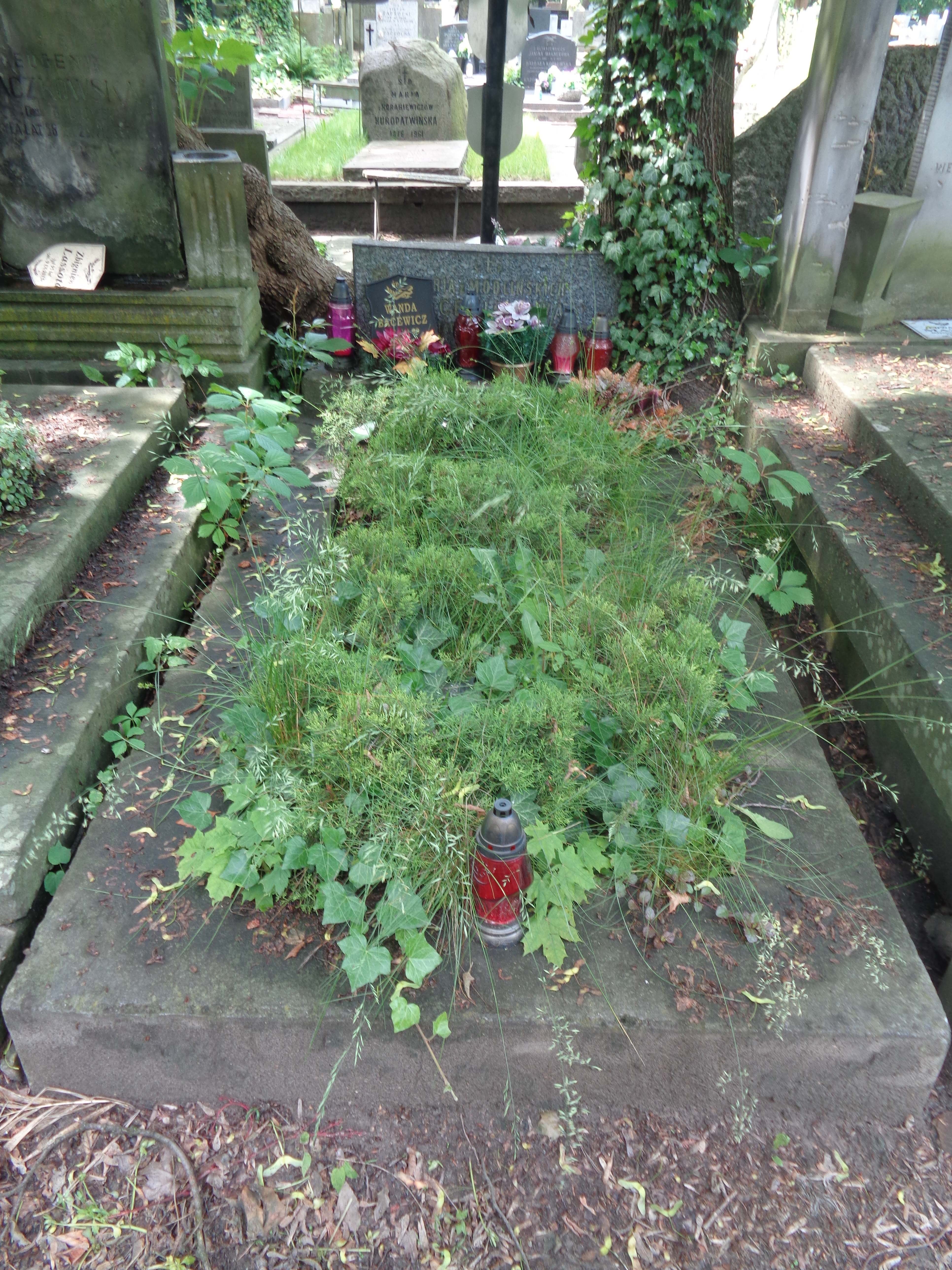 Grób Wandy Bacewicz na Cmentarzu Powązkowskim